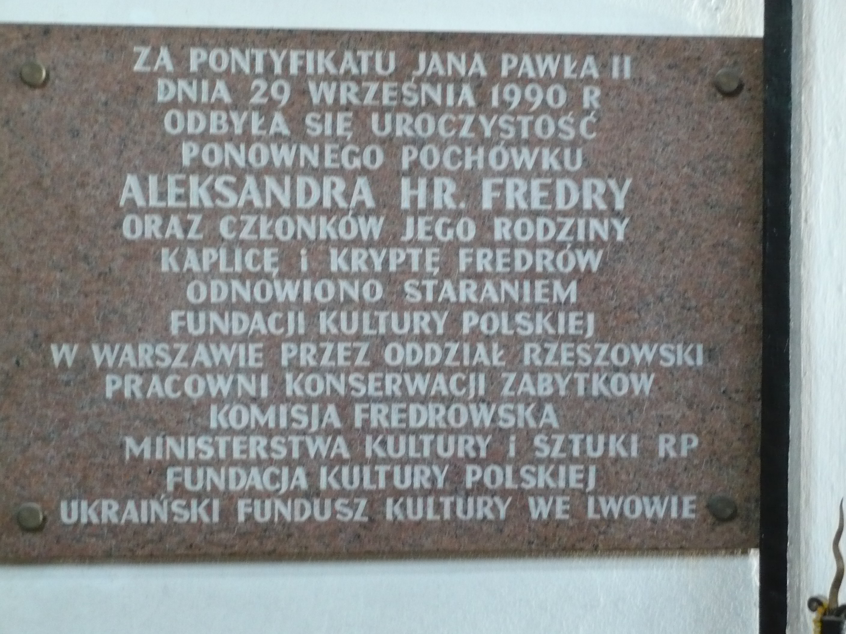 Tablica upamiętniająca odnowienie kaplicy i krypty oraz ponowny pochówek Fredrów